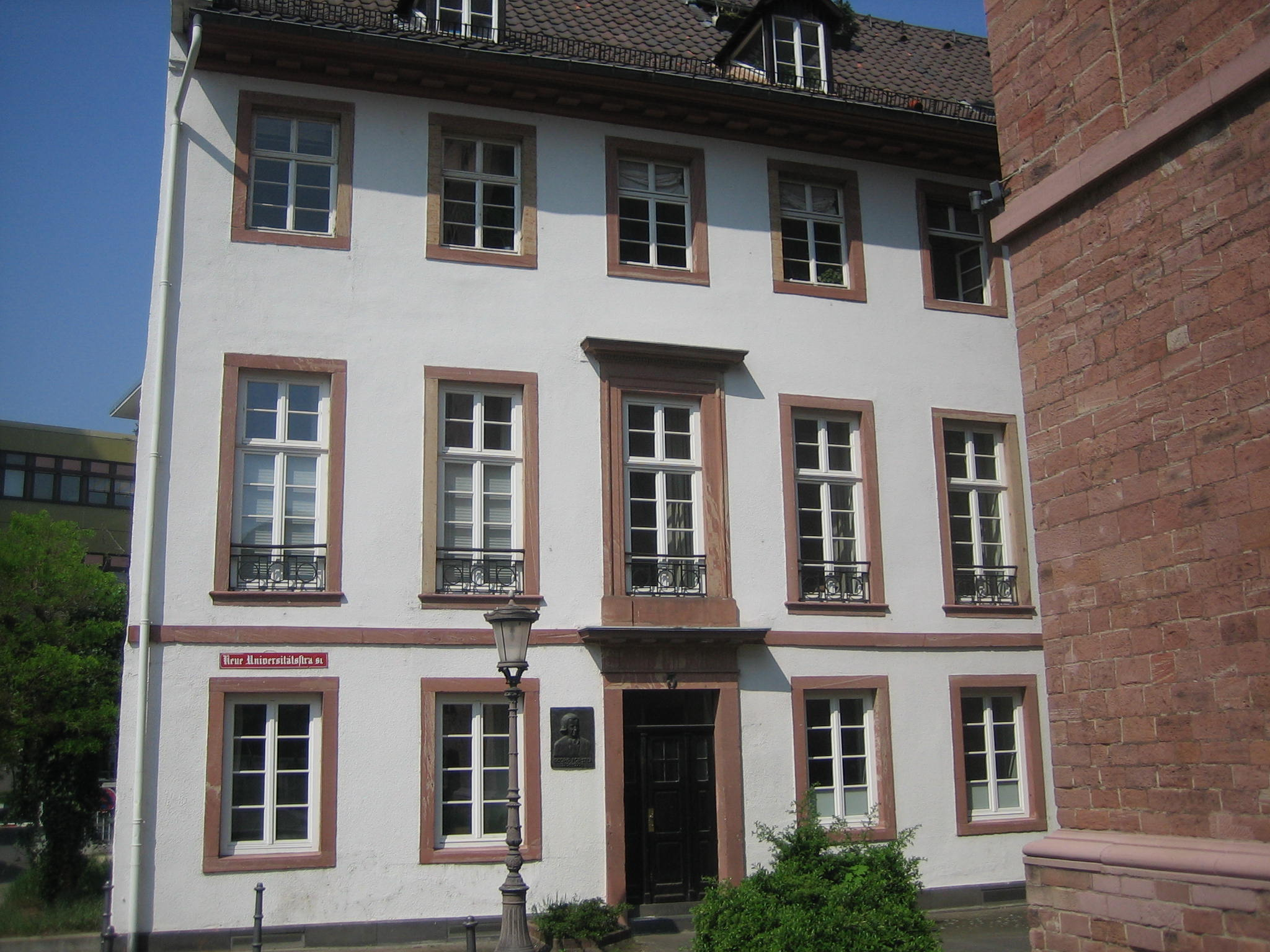 Wohnhaus Forsters in seiner Mainzer Zeit, Neue Universitätsstrasse 5